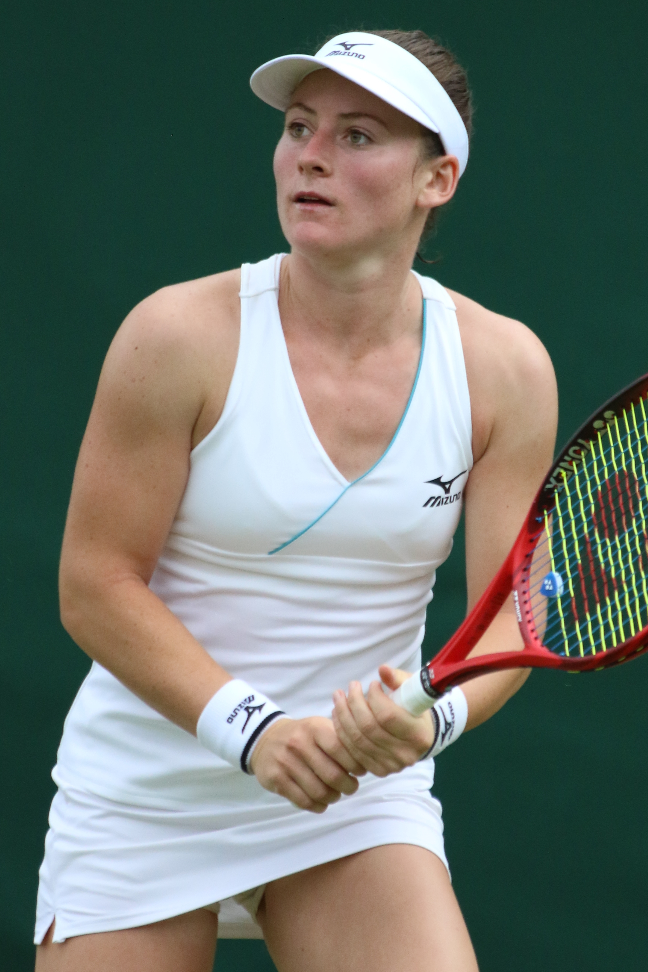 Zidansek WM19 (29)